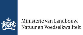 Het officiële logo van het Ministerie van Landbouw, Natuur en Voedselkwaliteit